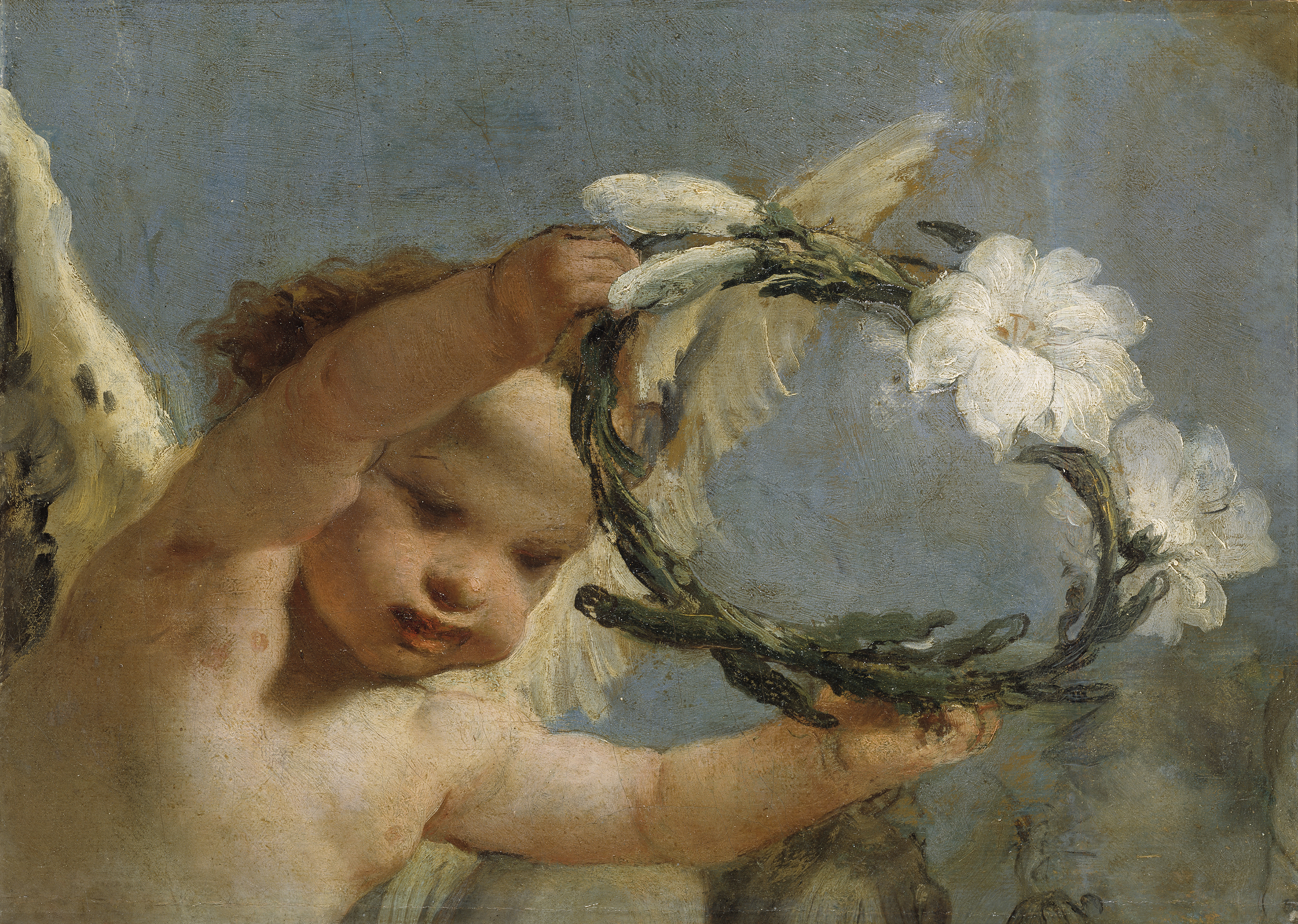 Ángel con corona de azucenas, 40 × 53 cm. Madrid, Museo del Prado.